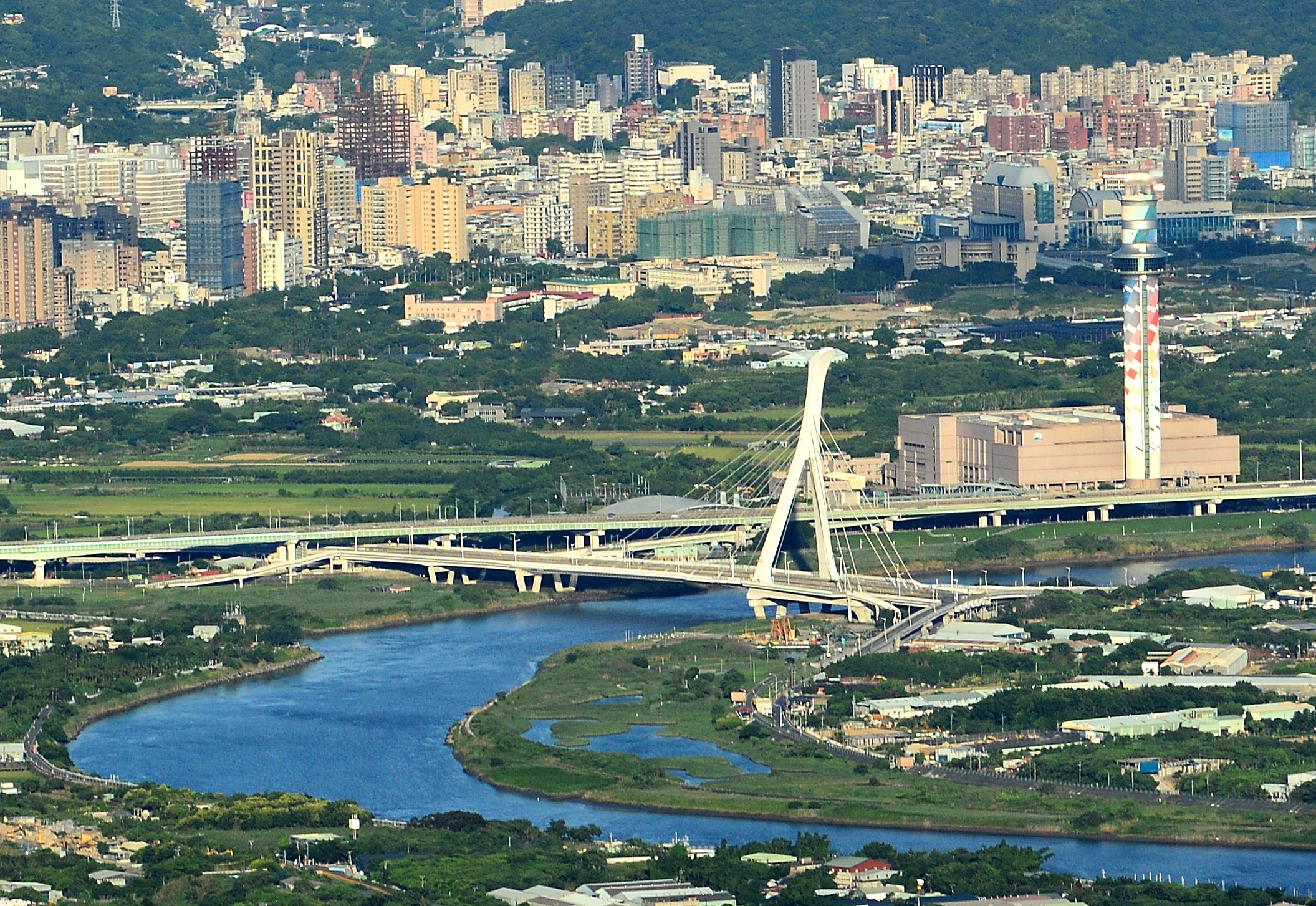 北投垃圾焚化廠與基隆河社子大橋。